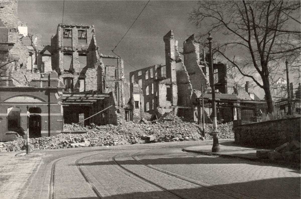 Der Kapellplatz in Darmstadt mit Kriegszerstörung nach der "Brandnacht" vom 11. September 1944